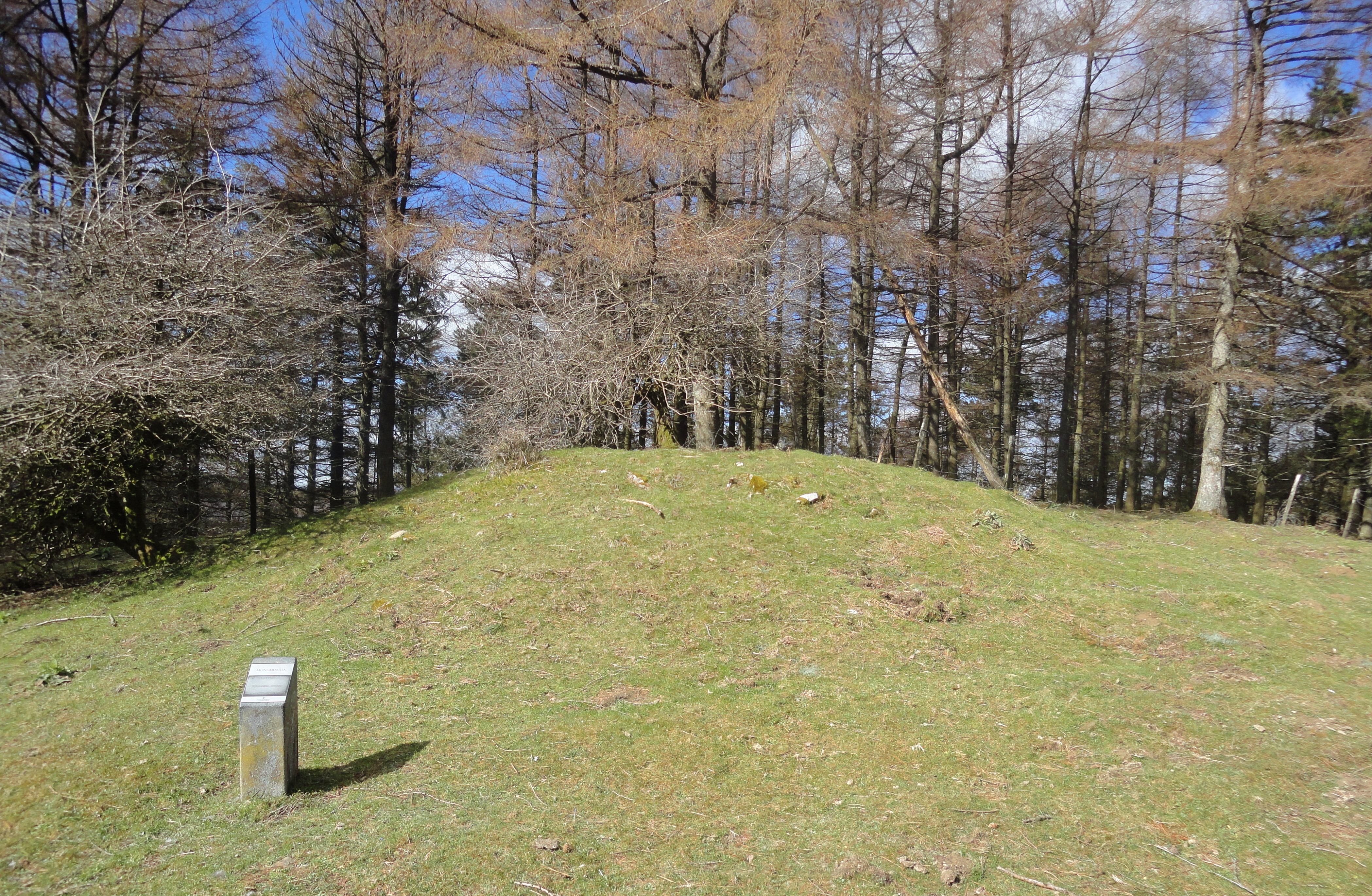 Iruarrieta II trikuharria - Zumarraga